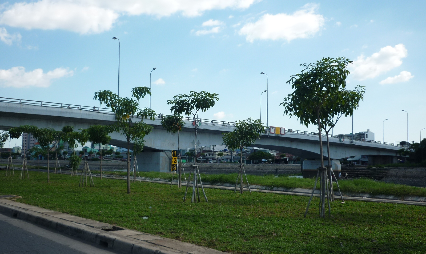 Cầu Nguyễn Tri Phương bắc qua kênh Tàu Hũ nối liền hai quận 5 và 8.